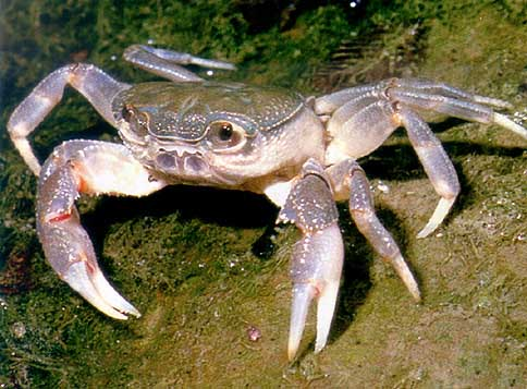 Potamon fluviatile (Herbst, 1785)